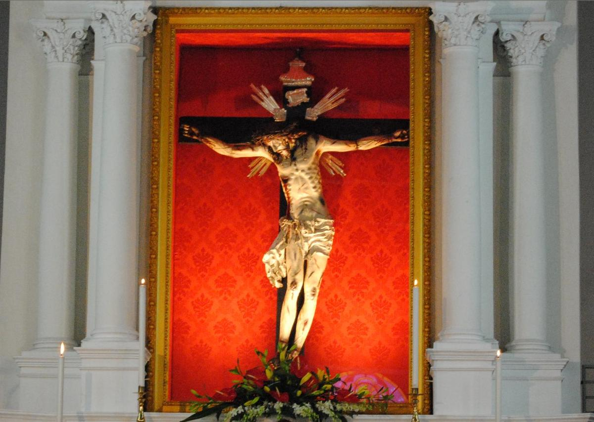 Il Crocifisso ligneo del XVII secolo, collocato nell'altare maggiore all'interno dell'omonima chiesa a Palmi.